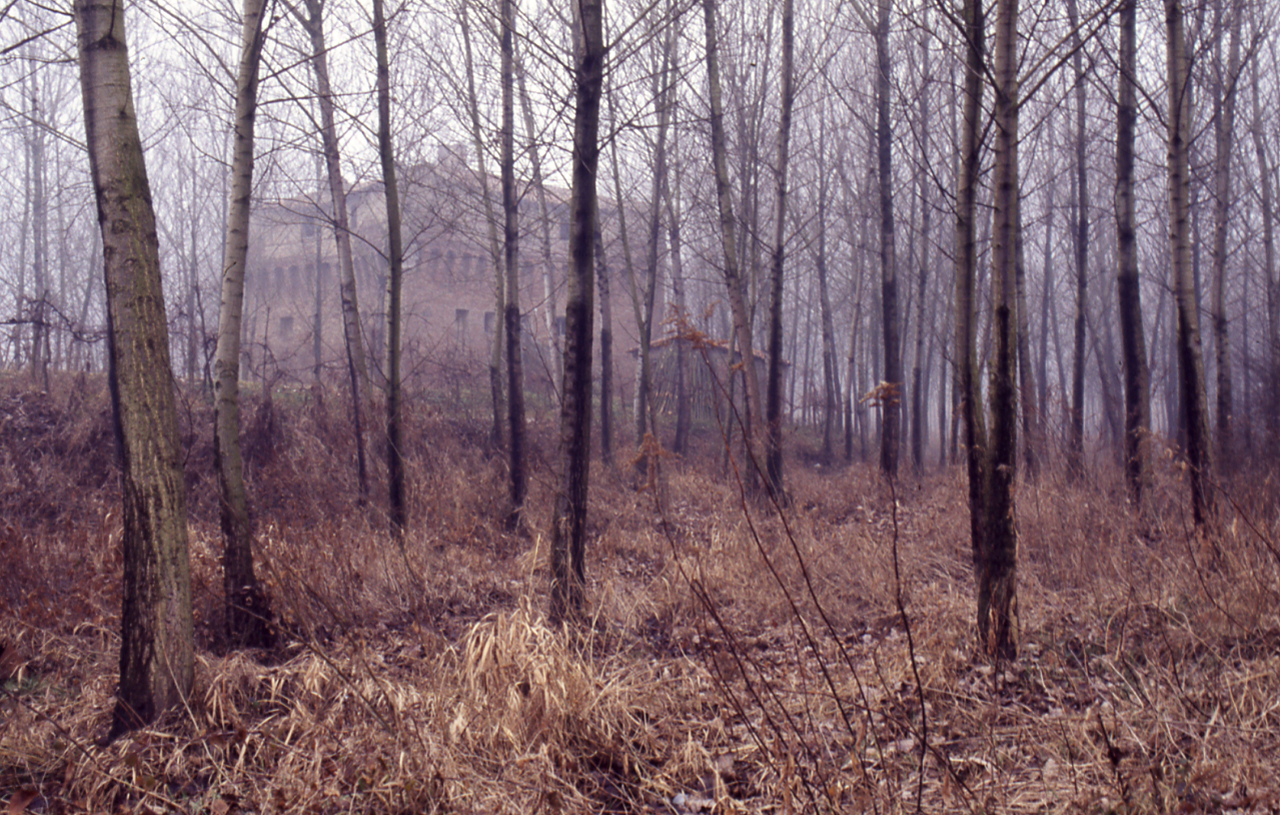 Ferrara (territorio). Bondeno. La Stellata di Bondeno. La Rocca di Stellata. Mesola. San Giustina di Mesola. Isippo Pontoni,Torre dell'Abate, 1568-1569, chiavica estense: vedute. Diapositive a colori formato 35mm sugli aspetti del patrimonio naturale, artistico e culturale della Regione. Dal territorio di Parma e Piacenza, fino a Ravenna e oltre, compreso il ferrarese e il Delta del Po, gli Appennini [...]